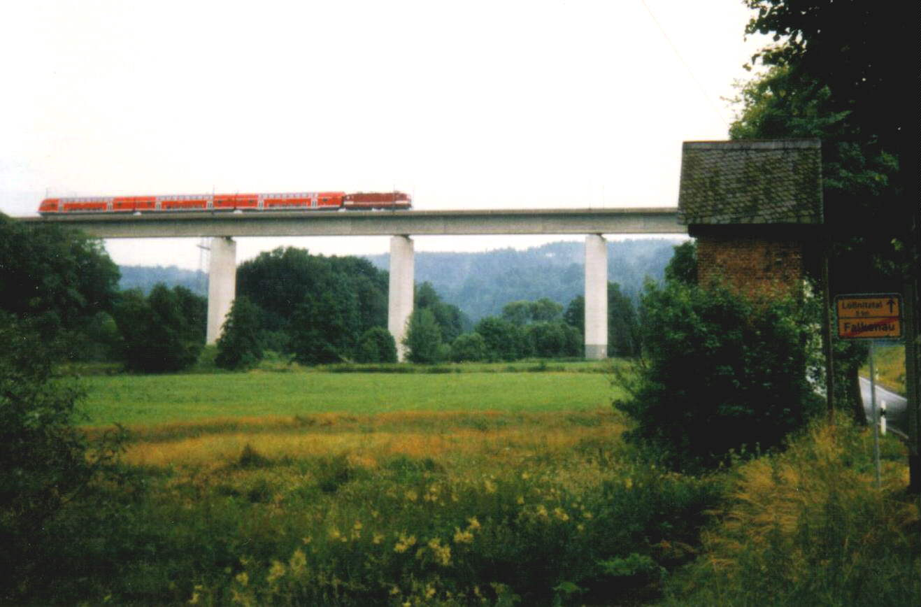 Neuer Hetzdorfer Viadukt, Juli 1997. Aufnahme: Steffen Mokosch